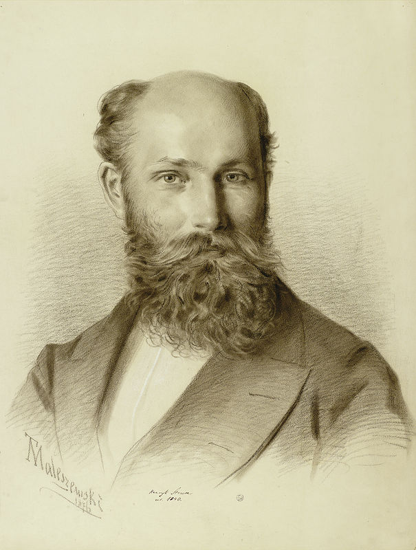 portret Henryka Struve na papierze beżowym, węgiel, kreda